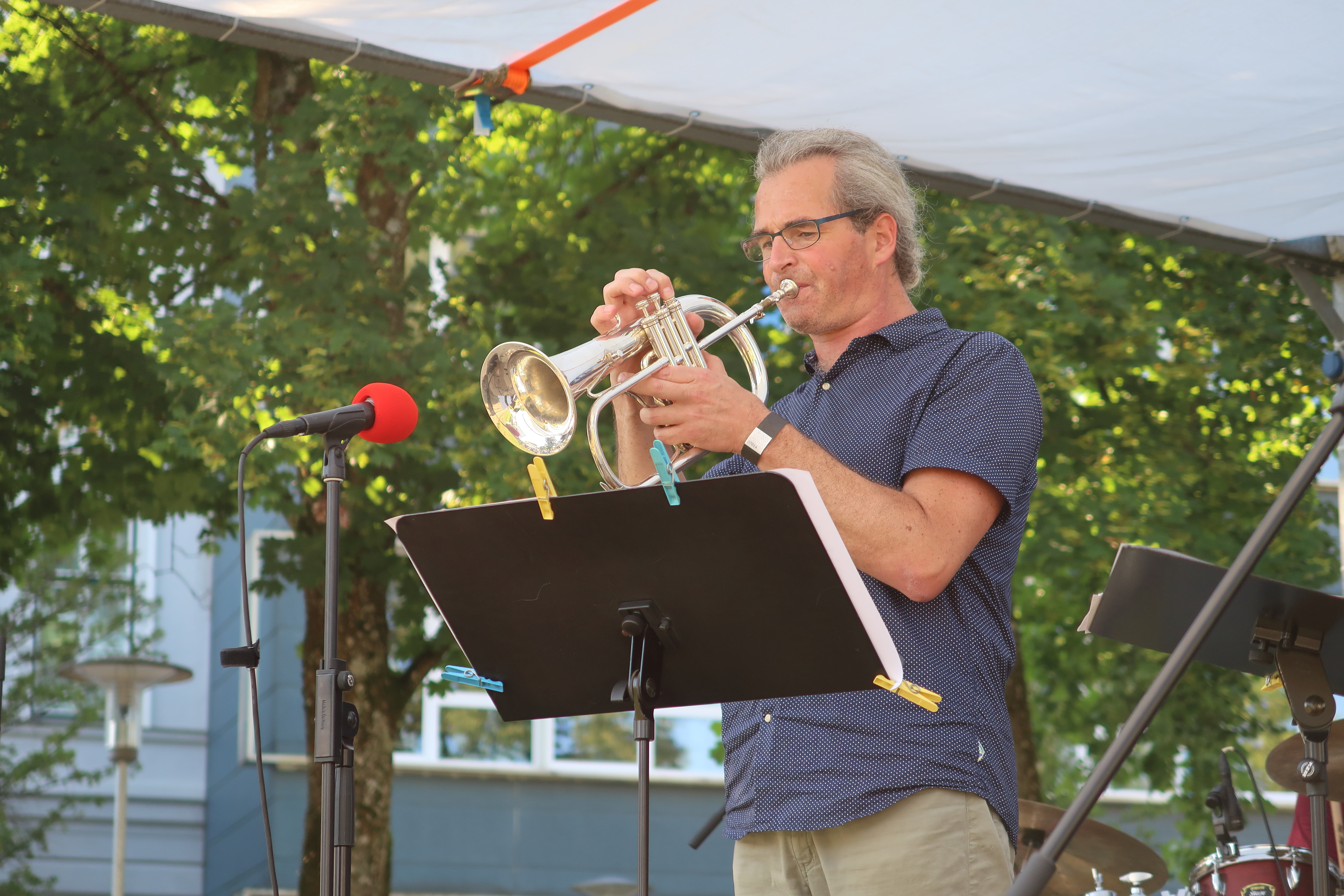 Manfred Paul Weinberger, Jazz-Trompeter und Komponist, bei seinem Auftritt bei »Jazz im Park« mit der Gruppe »Manfred Paul Weinberger QuARTet« am 2016-09-10 in Vöcklabruck